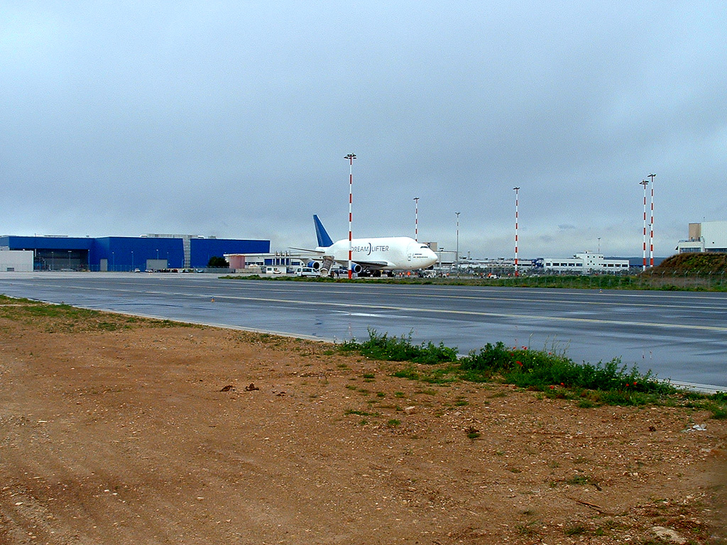 Veduta della pista dell'Aeroporto di Taranto-Grottaglie con il Boeing 747-400 LFC